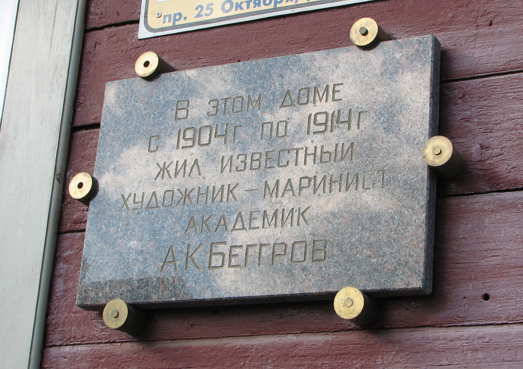 Мемориальная доска, посвящённая художнику Александру Карловичу Беггрову. Гатчина, Соборная улица, д. 8